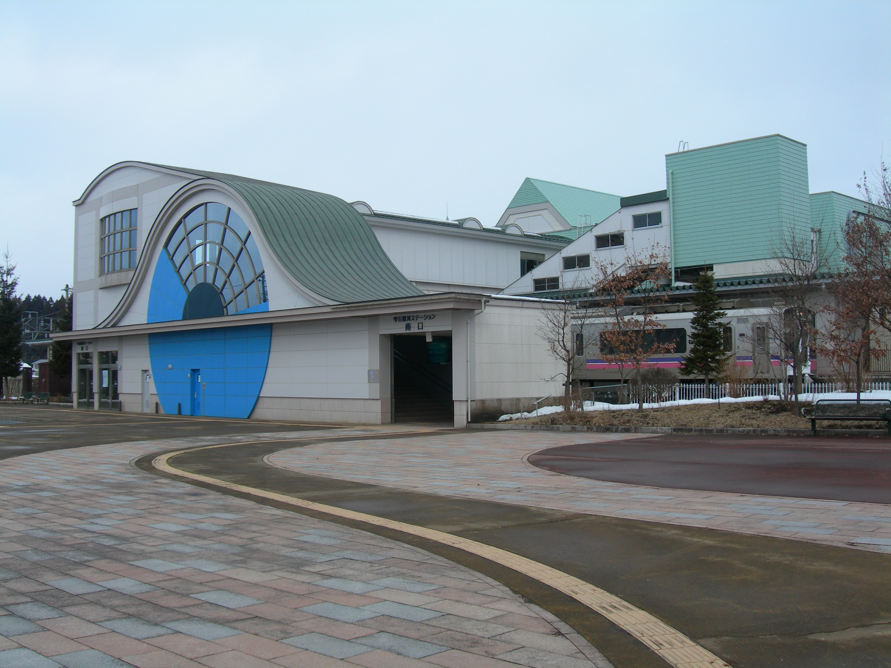 雫石駅南口